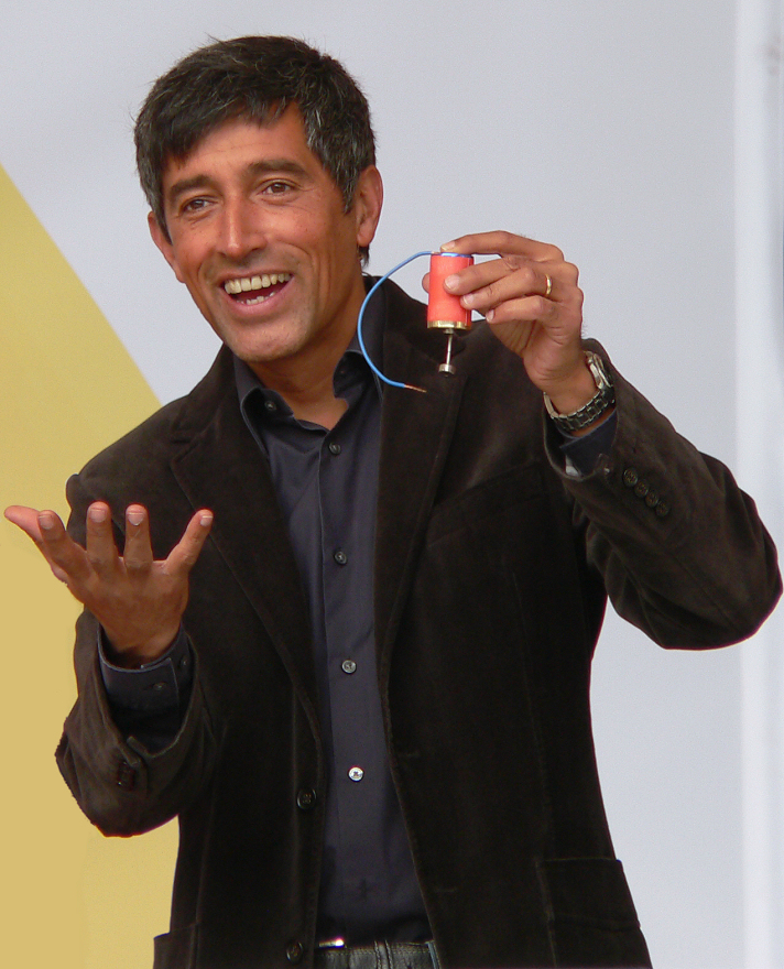 Ranga Yogeshwar bei der Ideenexpo 2011